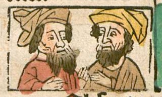 Pfister-NativitéDaniel et Habacuc